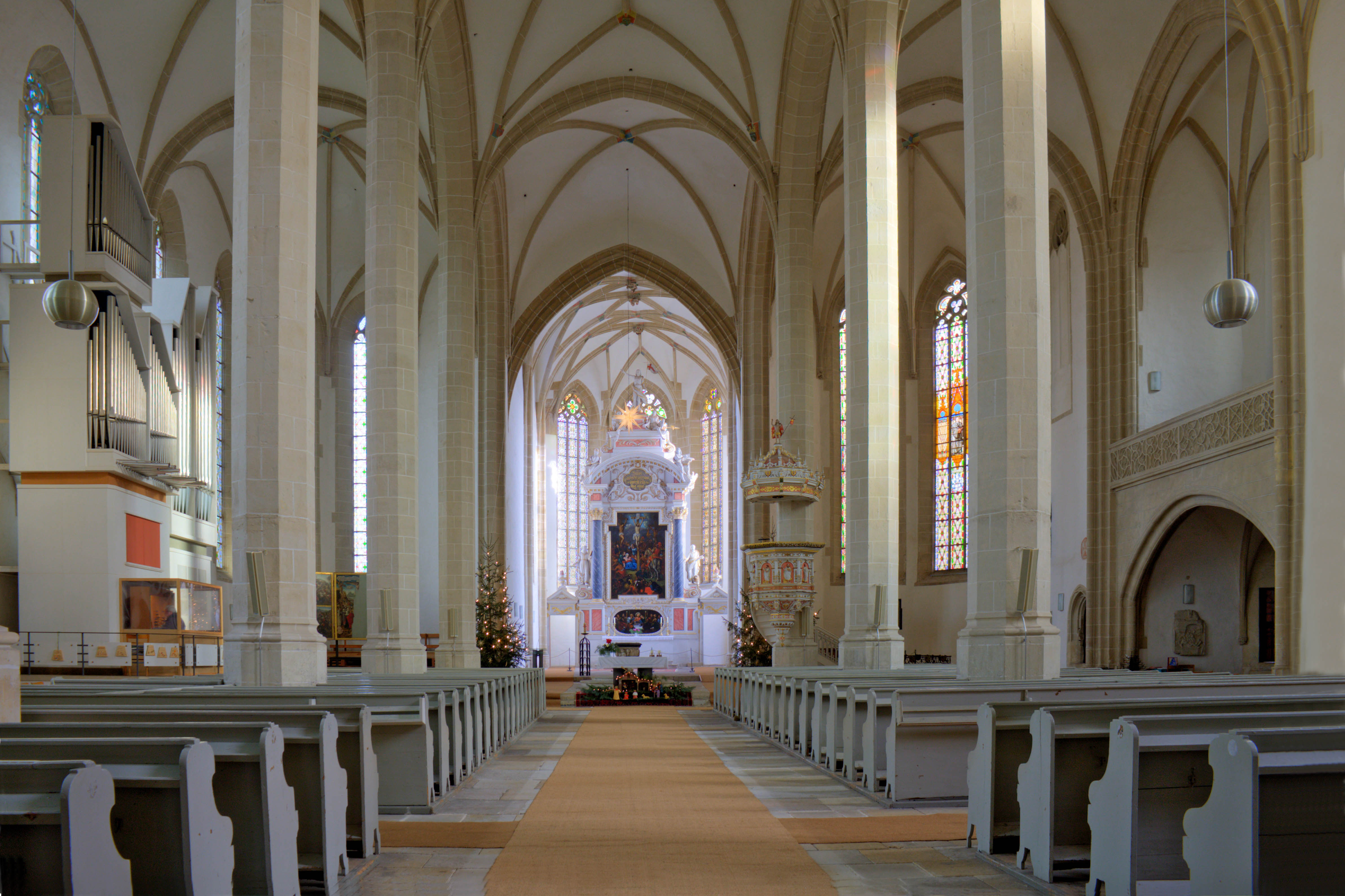 Stadtkirche St. Marien Innenansicht des Hauptschiffs